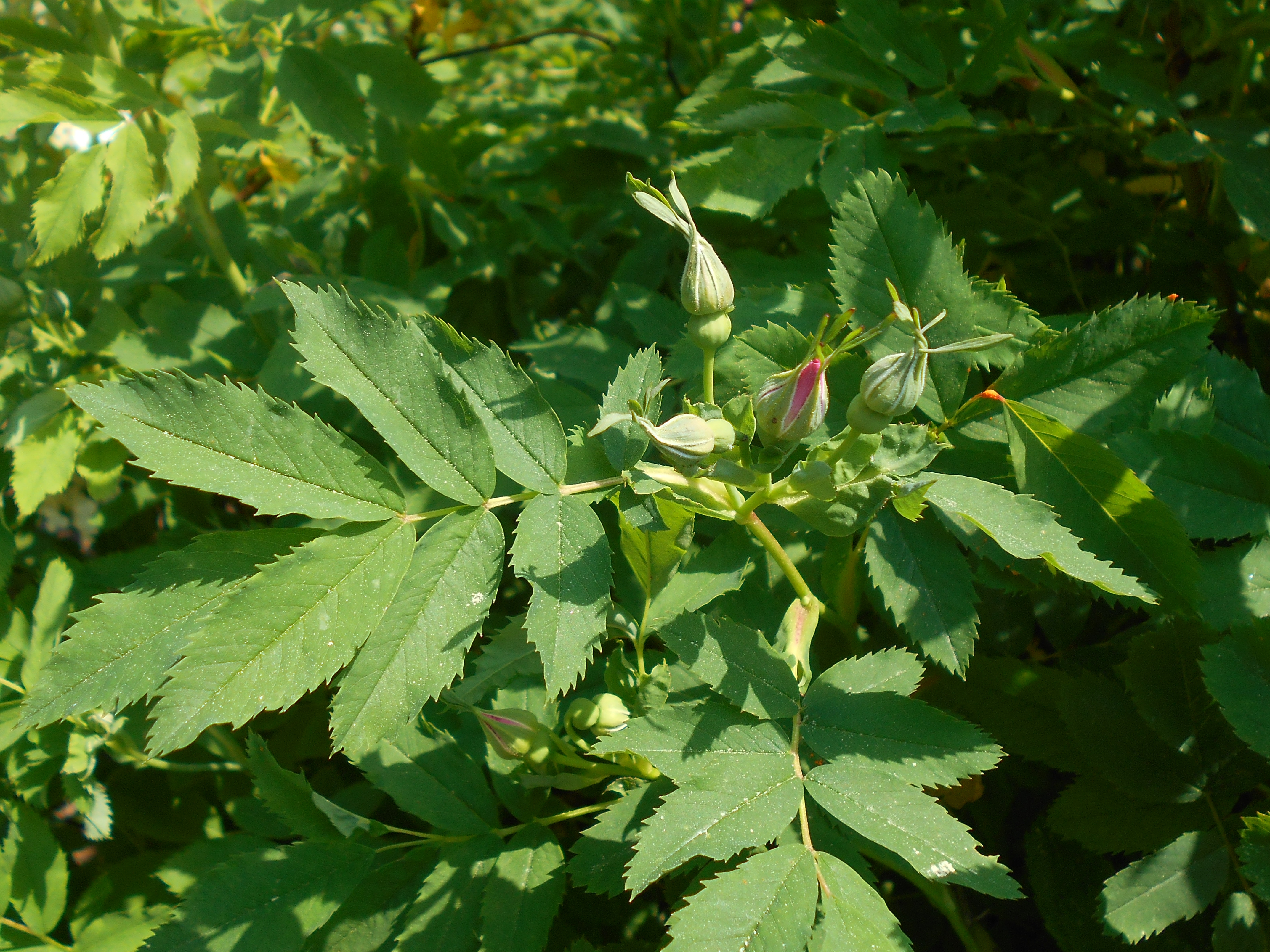 Róża labradorska (Rosa blanda), Botanischer Garten Berlin.